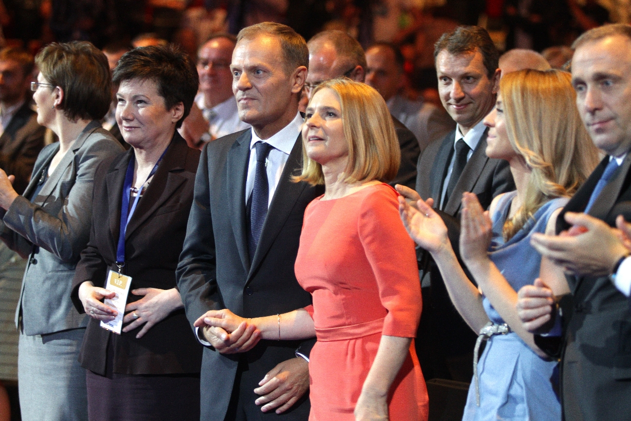 Ogólnopolska Konwencja Platformy Obywatelskiej Ergo Arena 11.06.2011